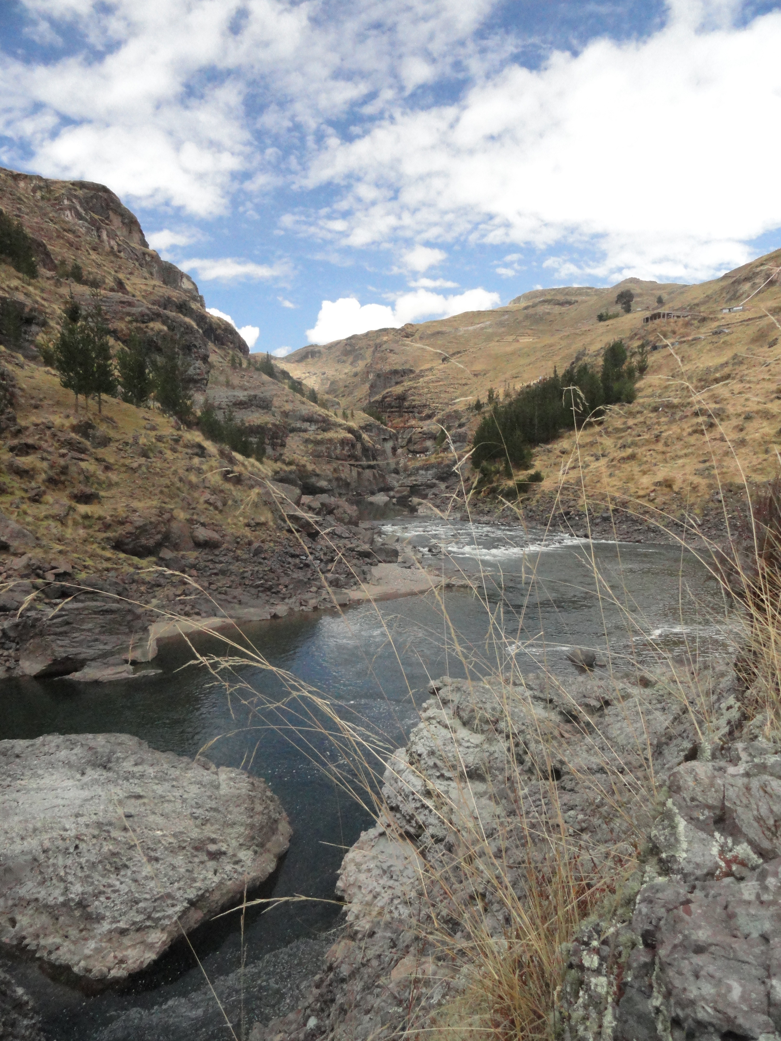 Esta planta crece en las alturas de la provincia de Canas - Cusco